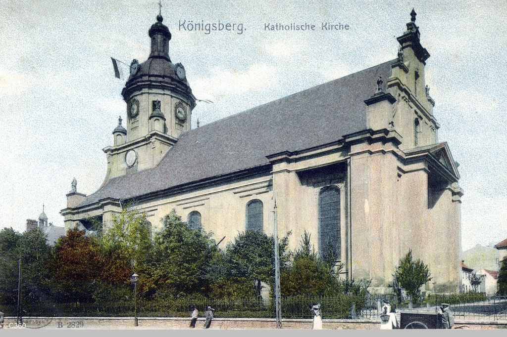 Probsteikirche in Königsberg